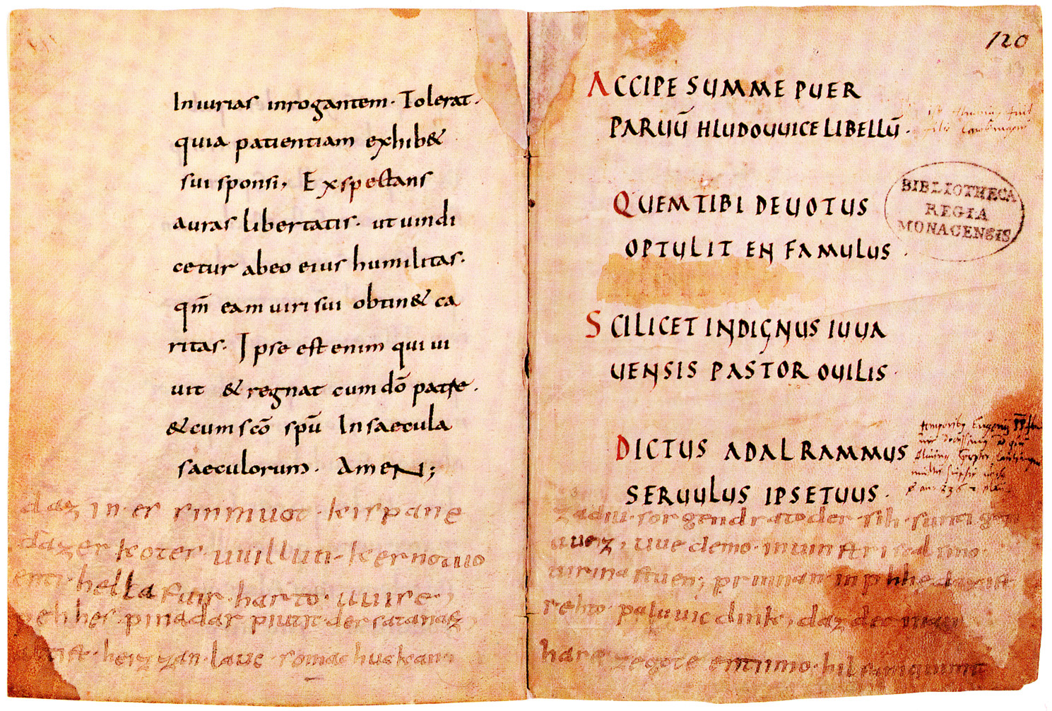 english: Page of the Muspilli manuscript from the 9th century. Old bavarian poem added on the bottom about 870 to the latin text from about 830 above. Today stored in Munich, Bavarian State Librarey (Bayerische Staatsbibliothek) signiture Clm. 14098, f. 119v und 120r castellano: una pagina del manuscrito Muspilli del siglo IX. Poema en bávaro antiguo que era escrito alrededor del año 870 abajo de un texto latin del año 830. Arquivado hoy en la bilbioteca del Estado libre de Baviera (Bayerische Staatsbibliothek) en Munich, signatura Clm. 14098, f. 119v und 120r boarisch: Saitn fum Muspilli Manuskript ausn 9tn Joahundat. Åid-Boarischs Gedicht wås ungefea um 870 auf da untan Saitn fu am latainischn Dext ausn Joa 830 dazua gschrim woan is. Ligt haid in da Boarischn Schdådsbibliodek (Bayerische Staatsbibliothek) in Minga unta da Signatua Clm. 14098, f. 119v und 120r deutsch: Seite des Muspilli-Manuskriptes aus dem 9. Jahrhundert. Ein alt-bayerisches Gedicht wurde um 870 unterhalb des lateinischen Textes aus dem Jahre 830 hinzugefügt. Heute wird es in der Bayerischen Staatsbibliothek in München aufbewahrt, unter der Signatur Clm. 14098, f. 119v und 120r